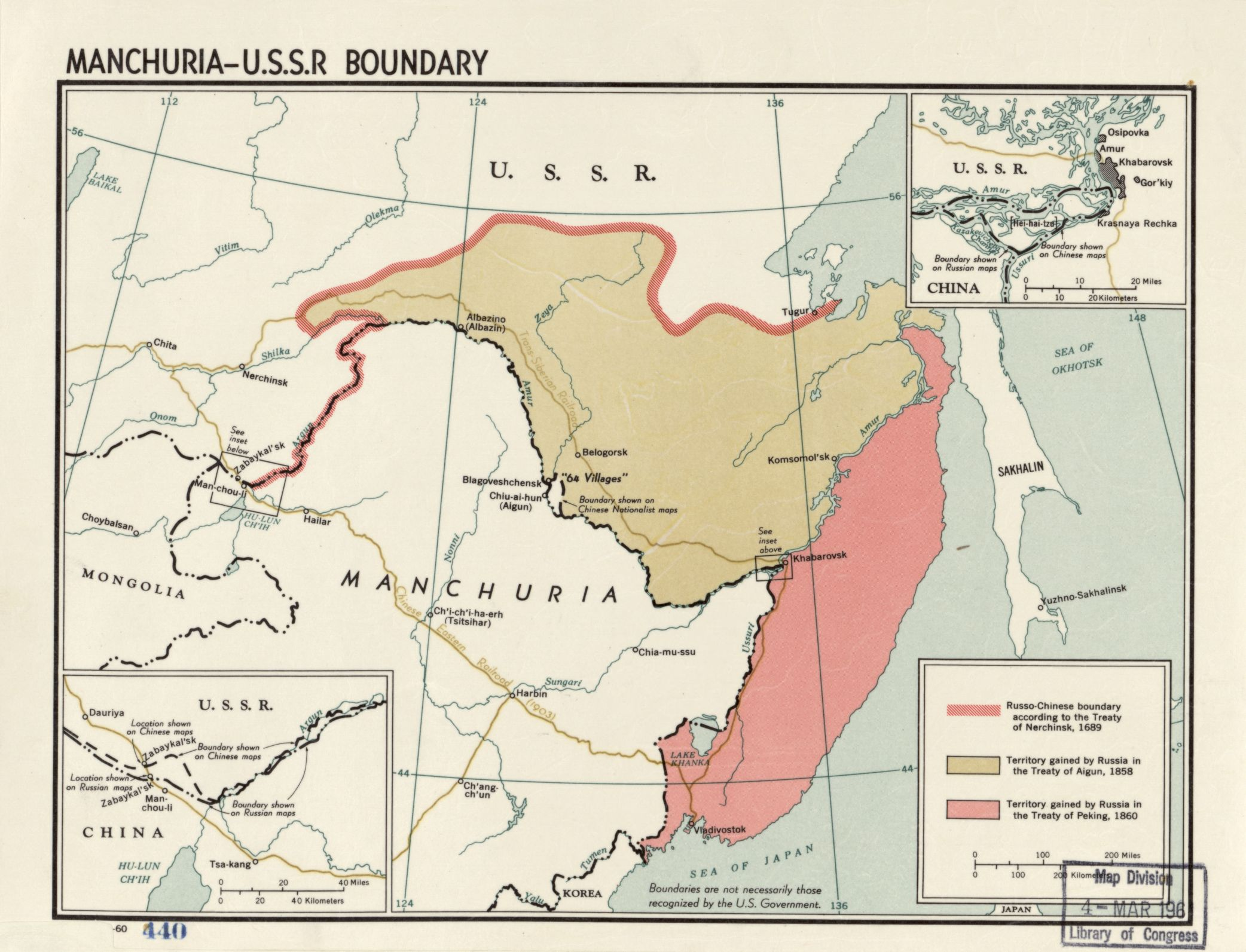 Карта территориальных изменений на современном Дальнем Востоке (РФ), которая иллюстрирует территориальные претензии КНР к РФ.